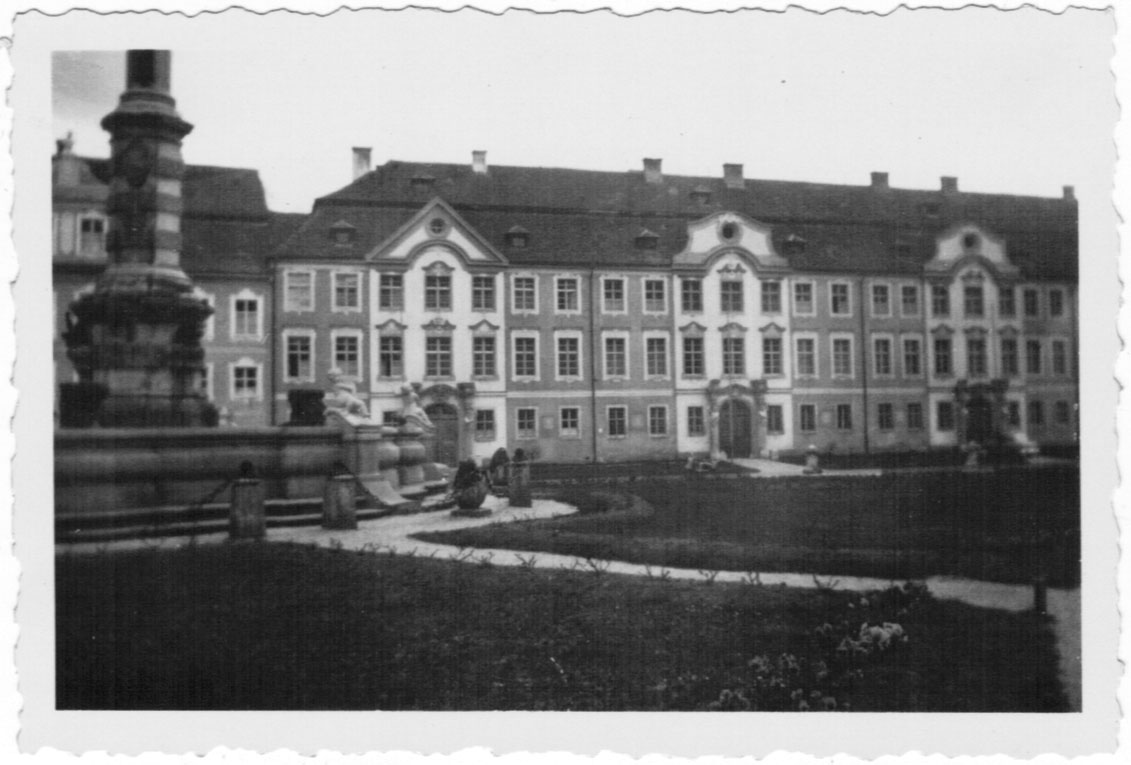 Eichstätt, April 1957